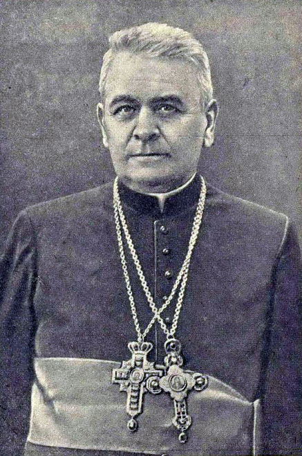 Гавриїл Костельник